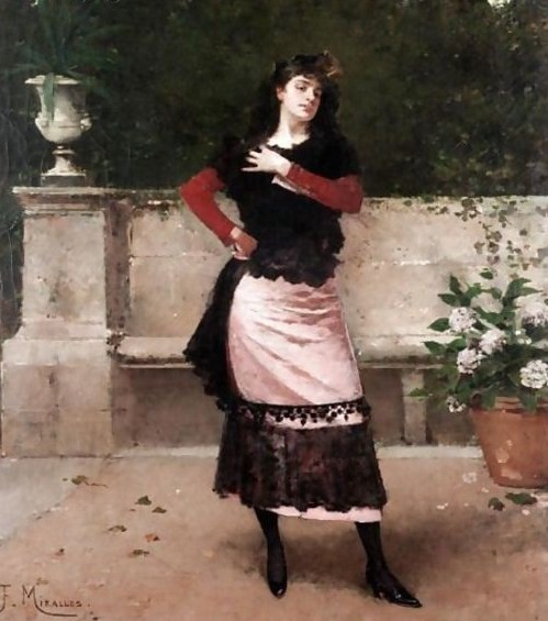 La Manola (c. 1878)